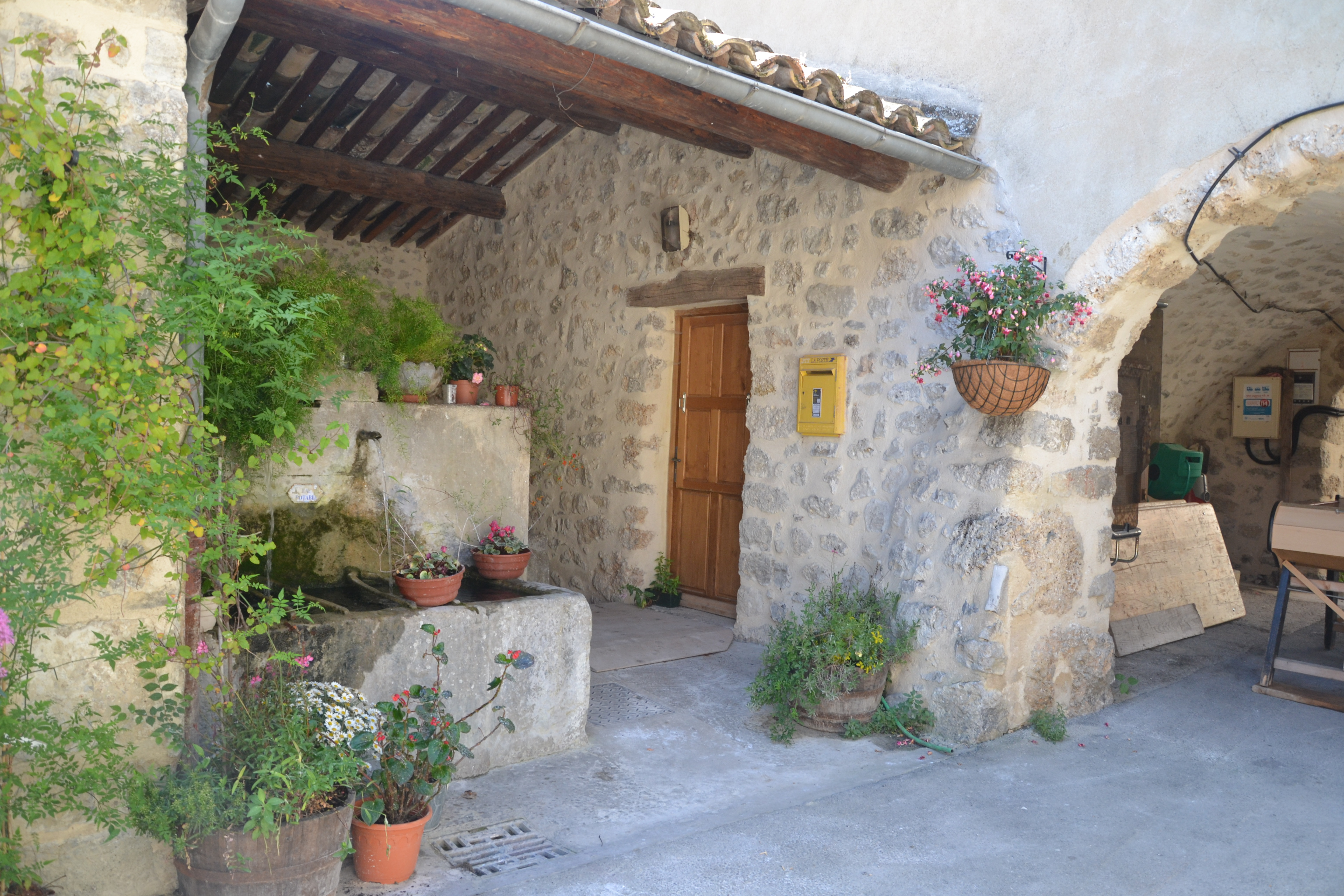 fontaine et lavoir de Montréal les Sources